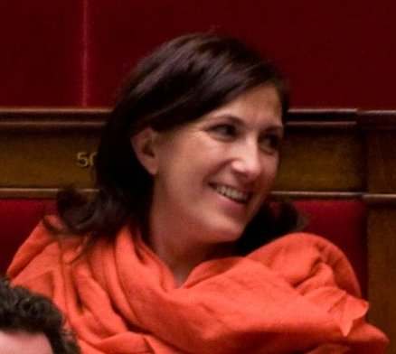 Sandrine Mazetier, députée française, lors des débats sur la Loi Création et Internet. CC Richard Ying pour LePost.fr